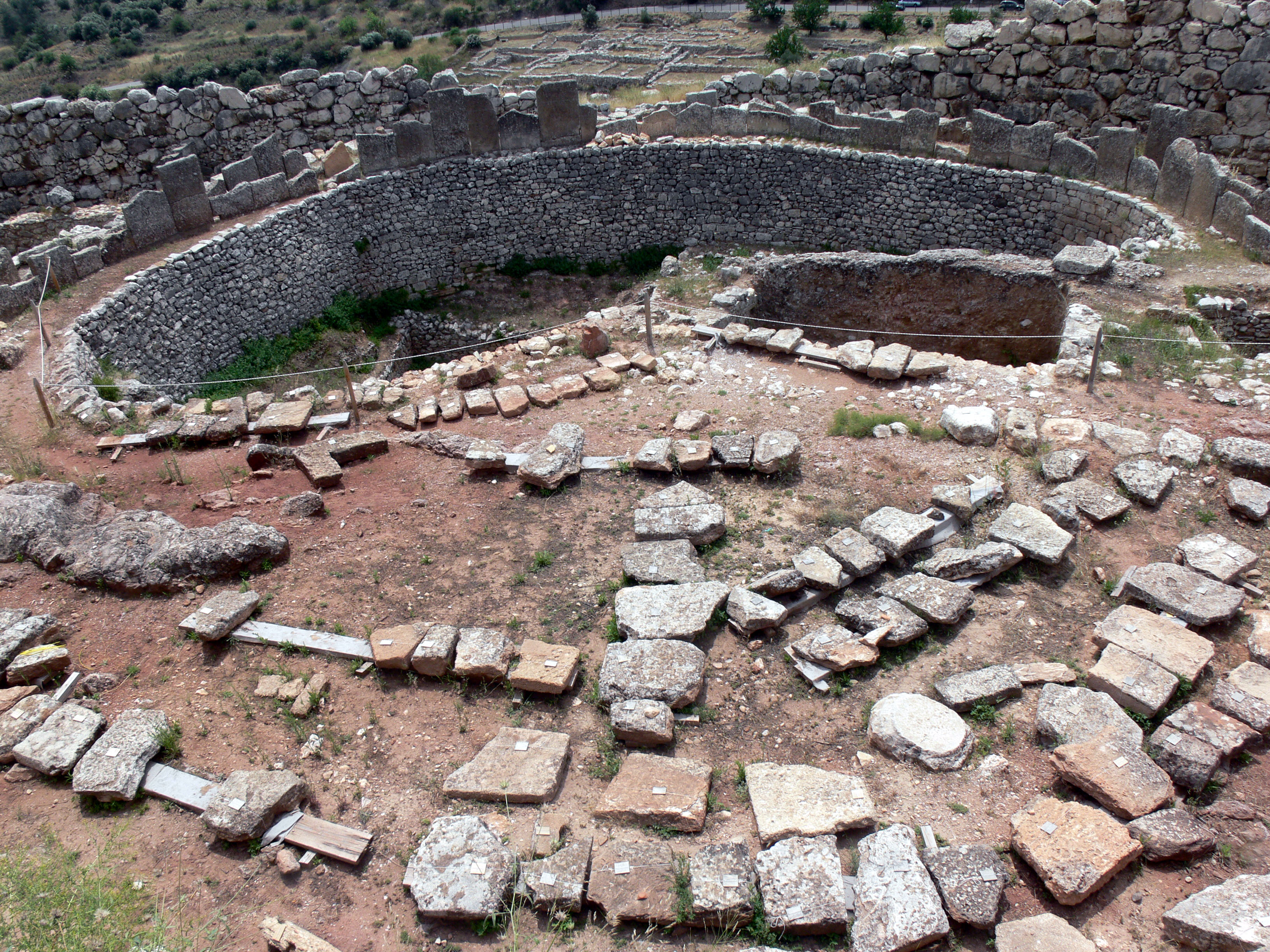 Mykene Palast. Rundgrab.